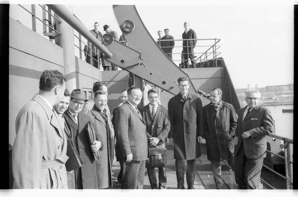 im Bau bei Howaldtswerke. Besichtigung durch Teilnehmer und Gäste der 6. Fachtagung des Deutschen Atomforums. Im Bild der Direktor des Instituts für Reaktorphysik der Reaktoranlage Geetshacht Prof. Dr. Erich Bagge (5.v.r.).